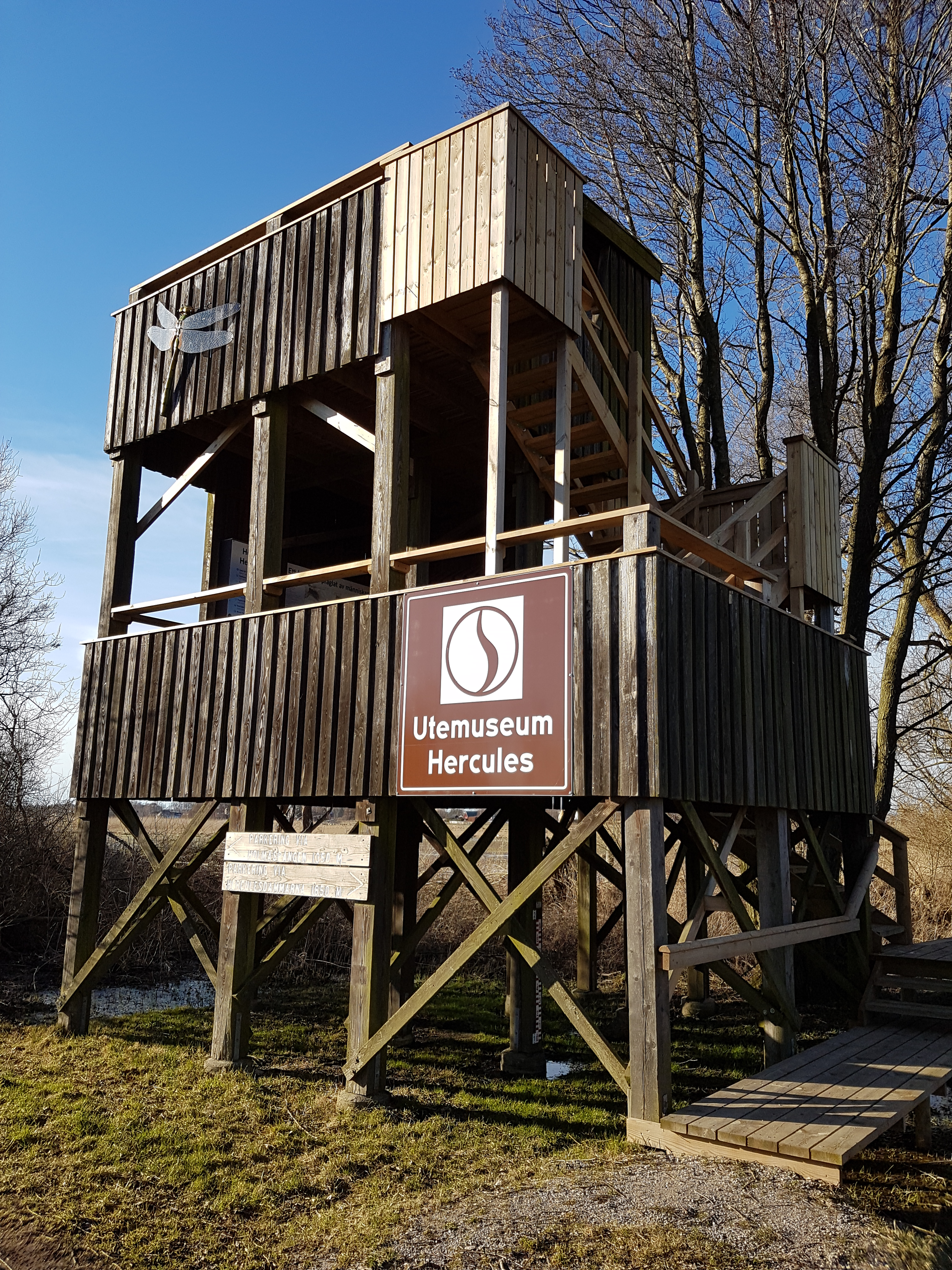 Fågeltorn med utemuseum i Hercules naturreservat i Kristianstads kommun mars 2017.